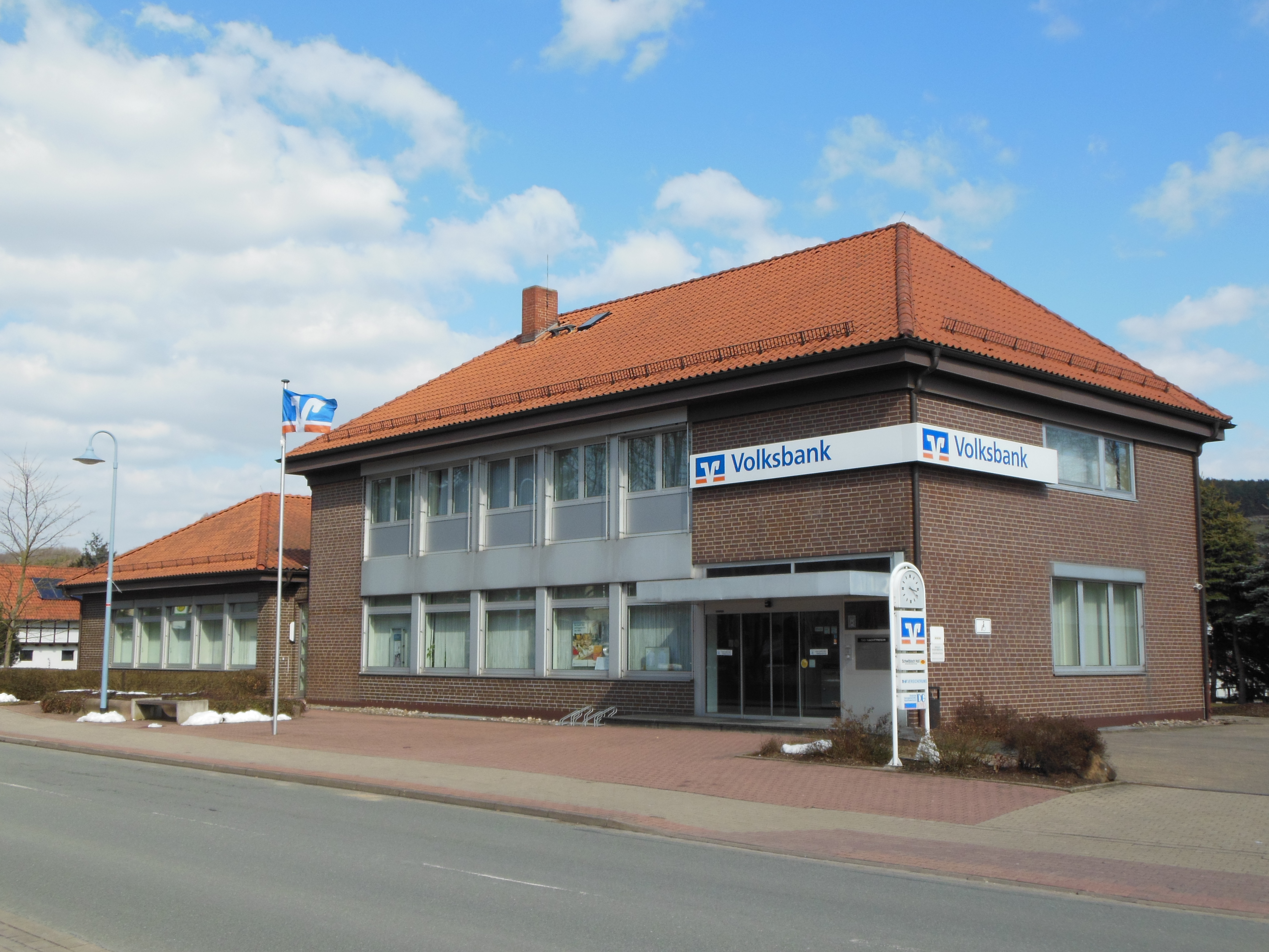 Frühere Hauptstelle der Volksbank eG in Dassel, Mackenser Straße 10-16, 37586 Dassel, Deutschland (seit Oktober 2013 Geschäftsstelle der VR-Bank in Südniedersachsen eG)